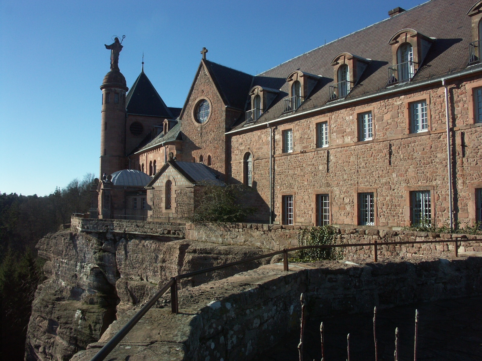 Mont Sainte-Odile, Alsace, France